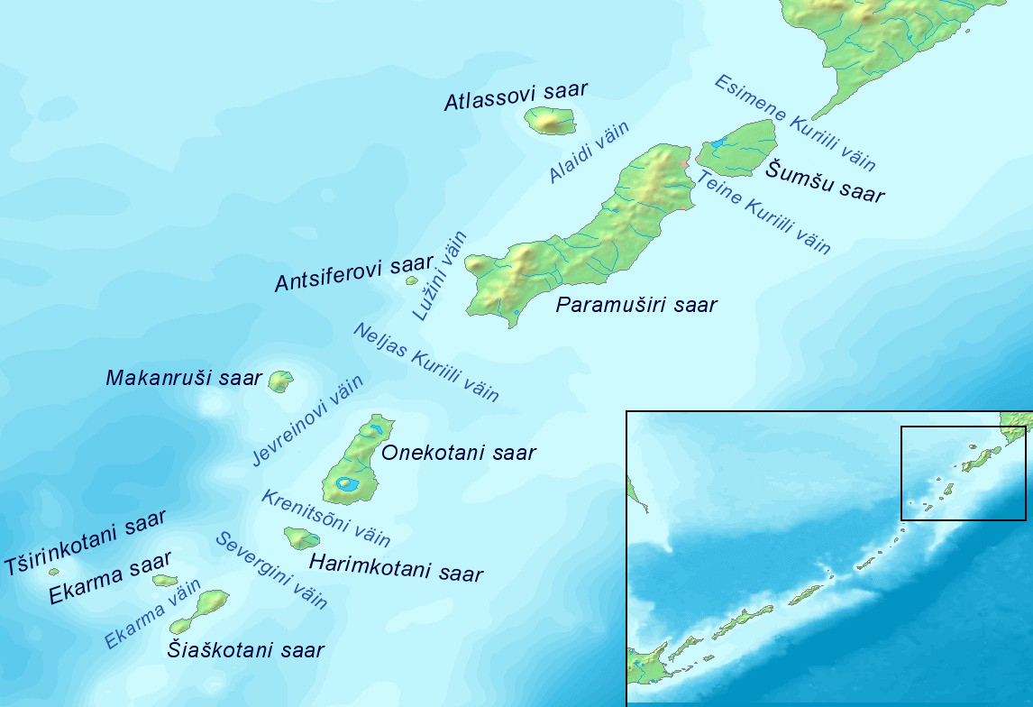 Kuriilide kirdeosa kaart